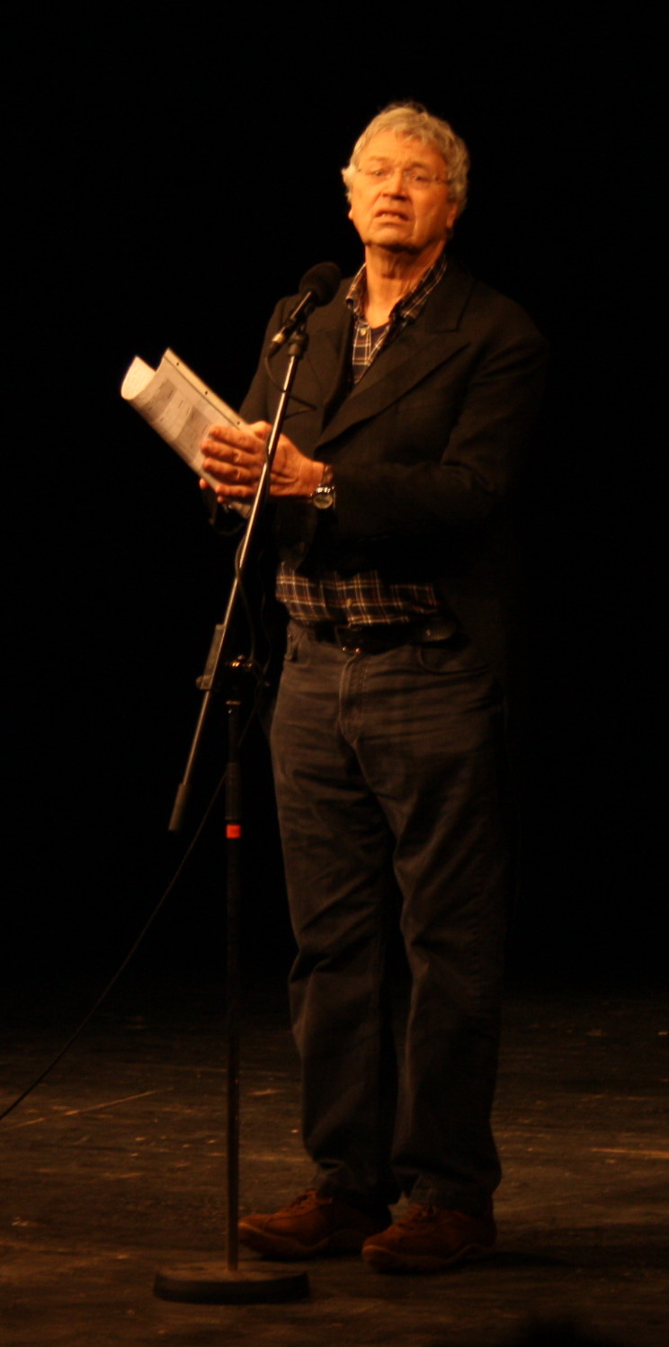 Gerhard Polt im Volkstheater bei der Verleihung des Großen Karl Valentin Preises.